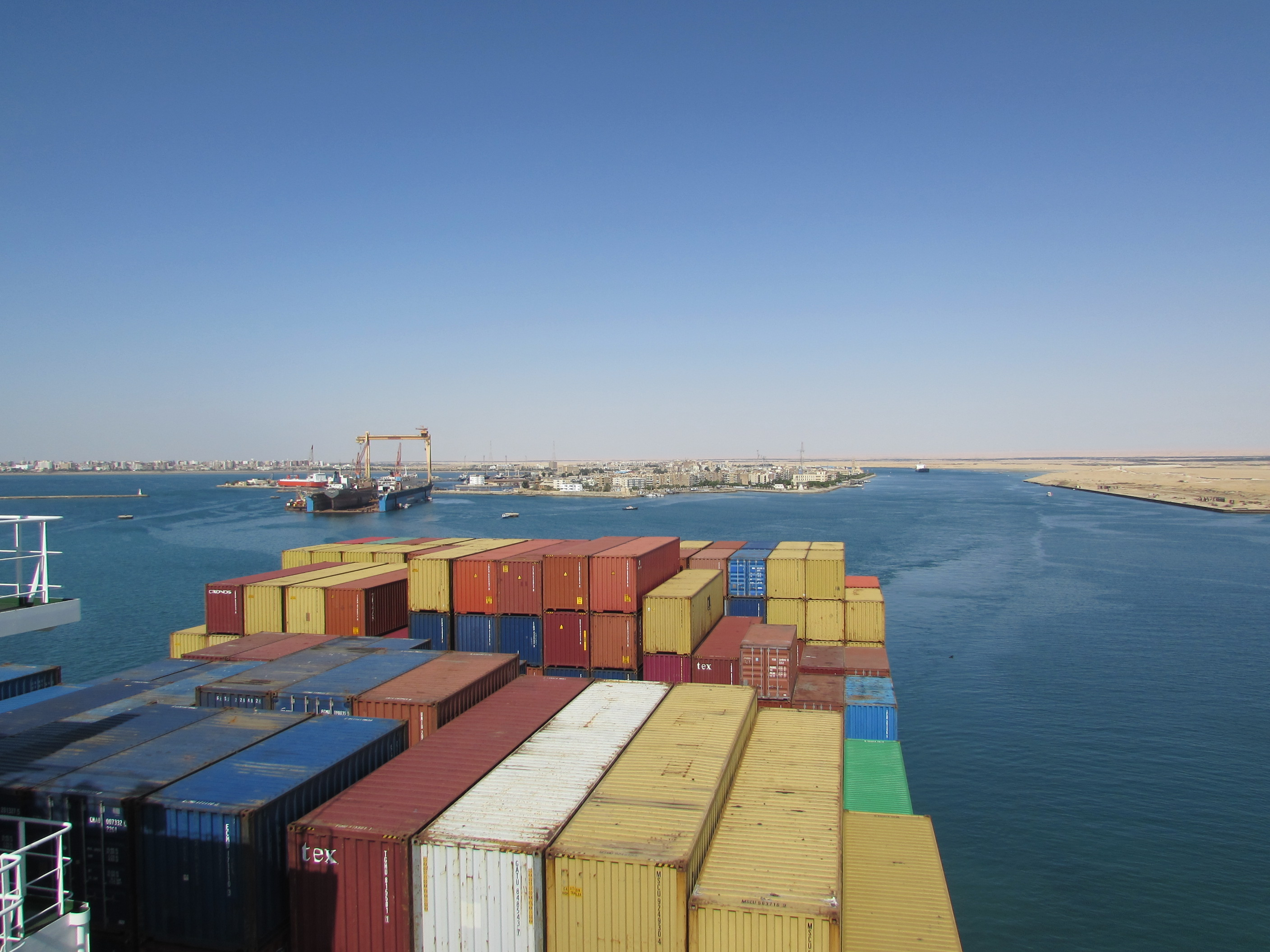 südlicheausfahrt aus dem suezkanal, hafen von sues